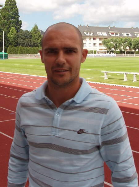 Benjamin Nivet